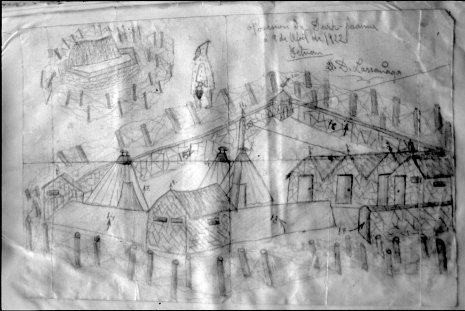 Rifeko Gerrako blockhaus baten krokisa, Demetrio Larrañaga errekluta eibartarrak egina.